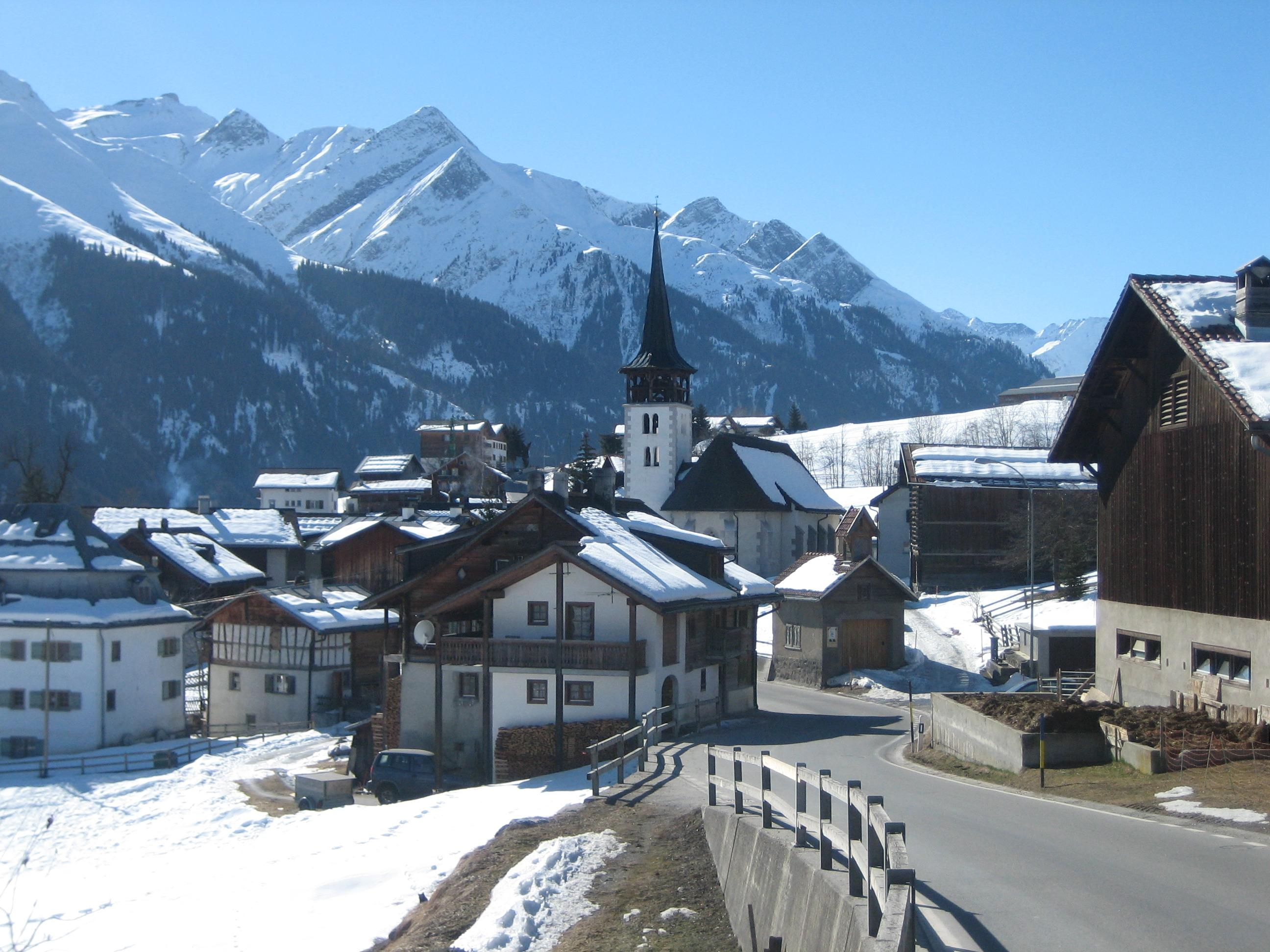 Vignogn